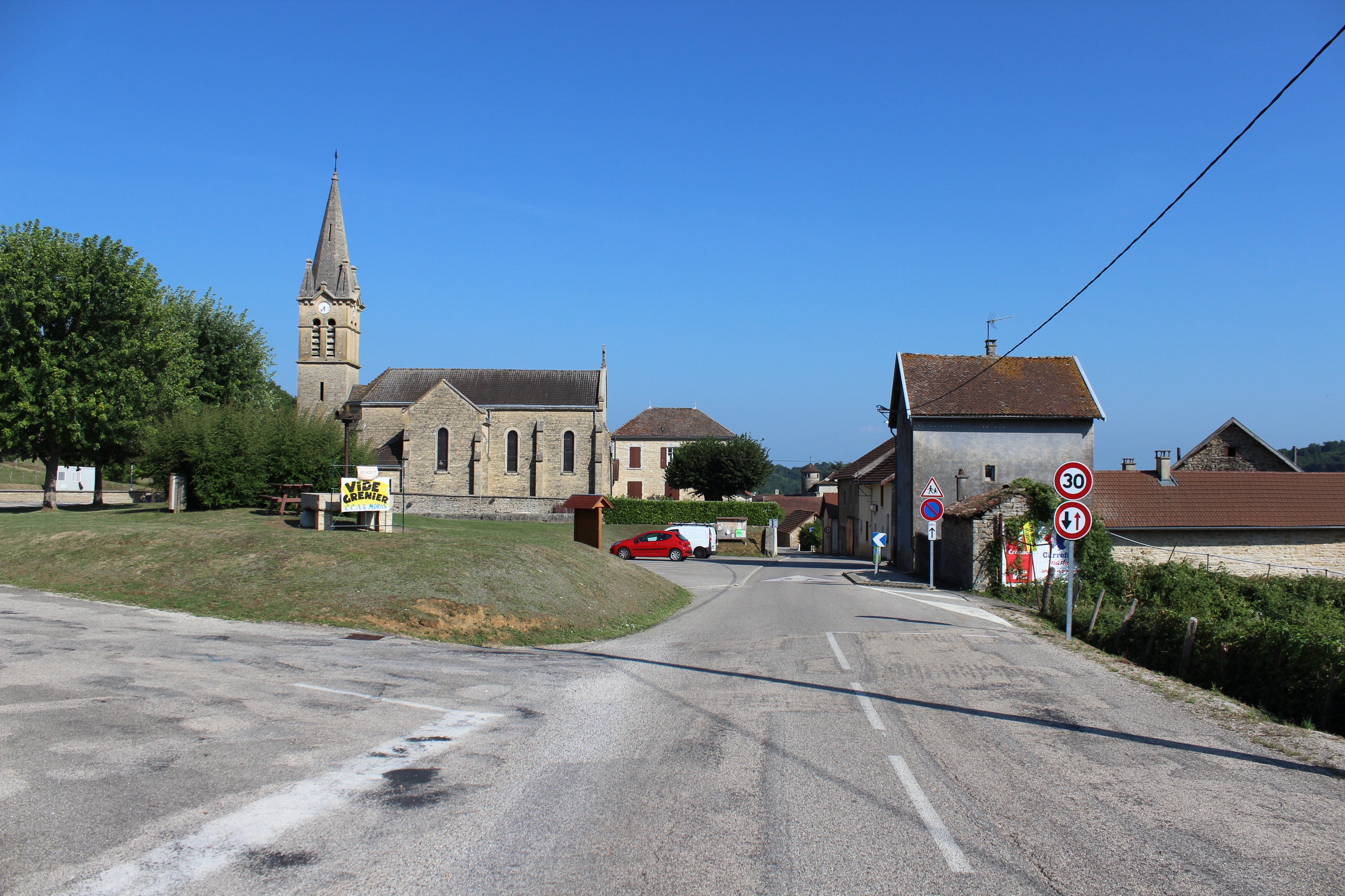 Place de l'église, à Moras.